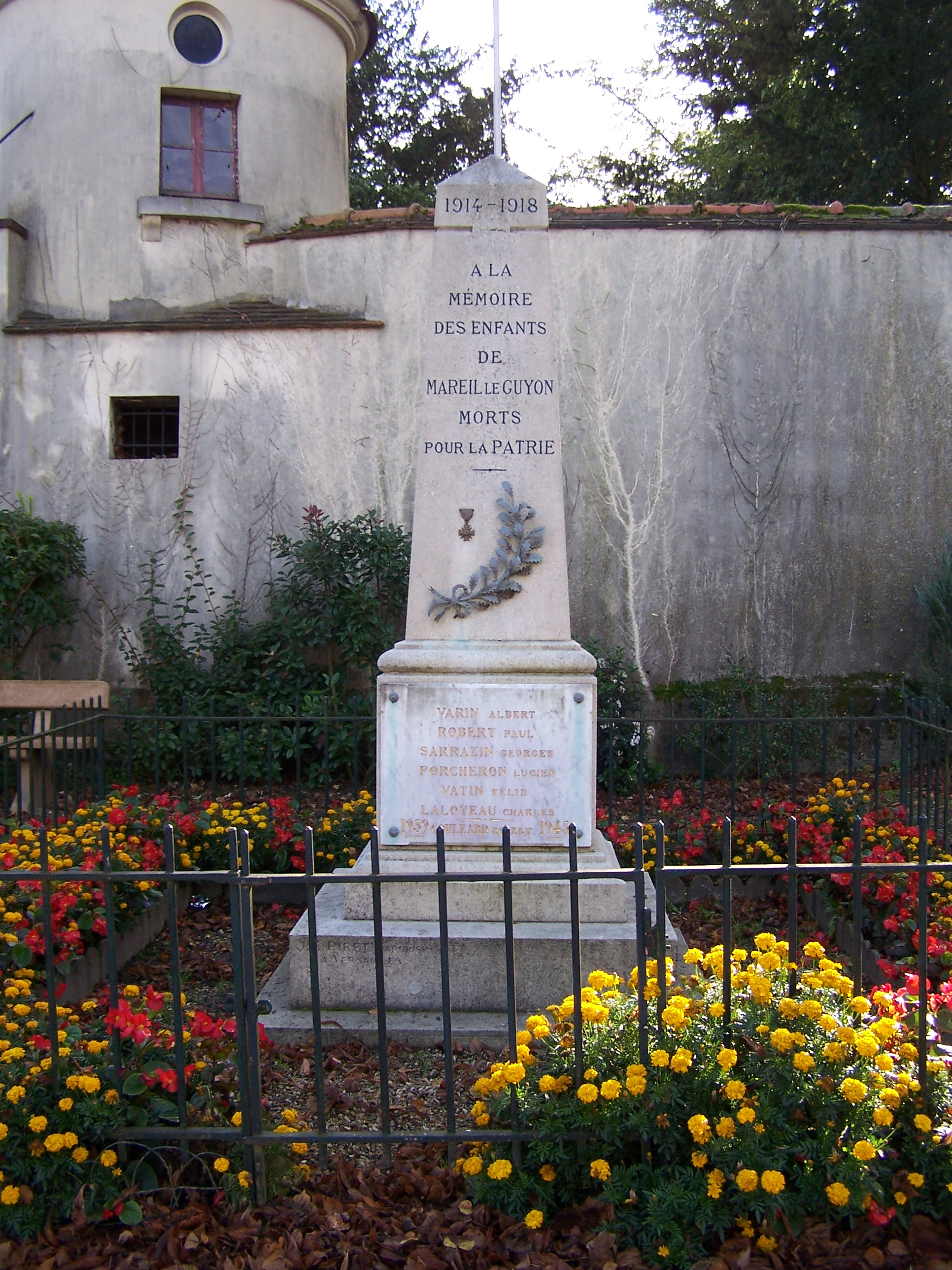 Monument aux morts de Mareil-le-Guyon (Yvelines, France)